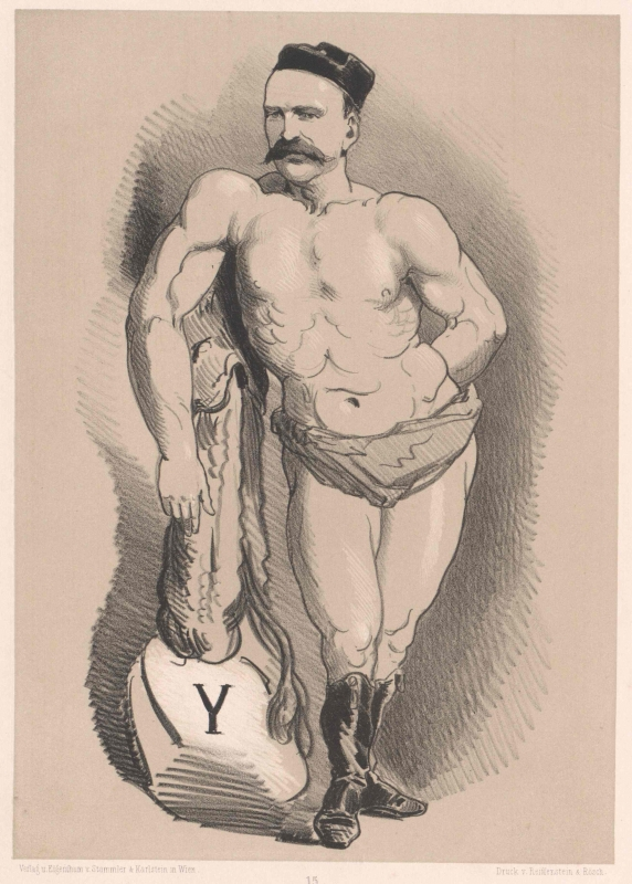 poslanec Říšké rady Anton Ryger na dobové politické karikatuře